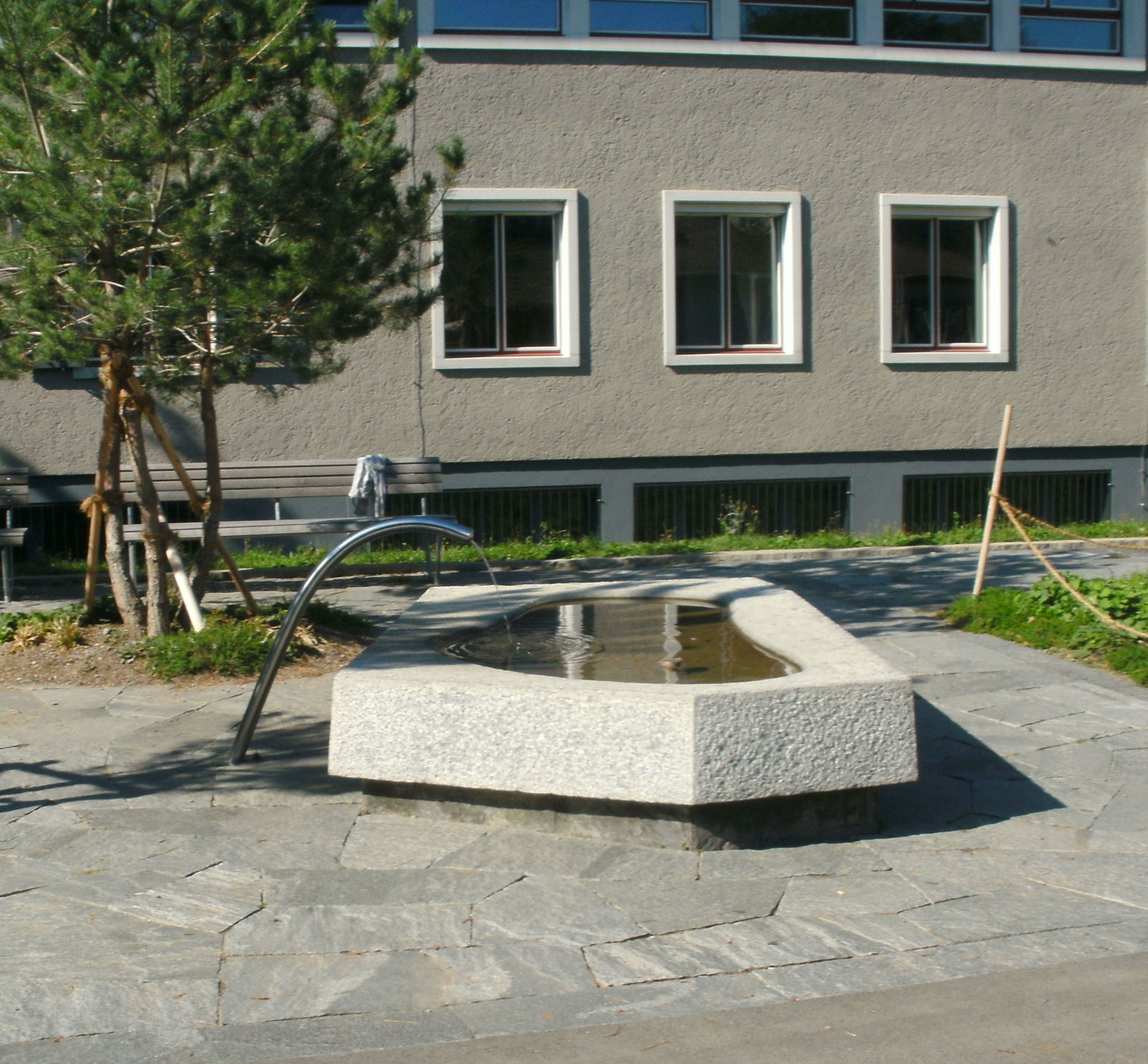 Detailansicht Brunnen auf dem Pausenplatz